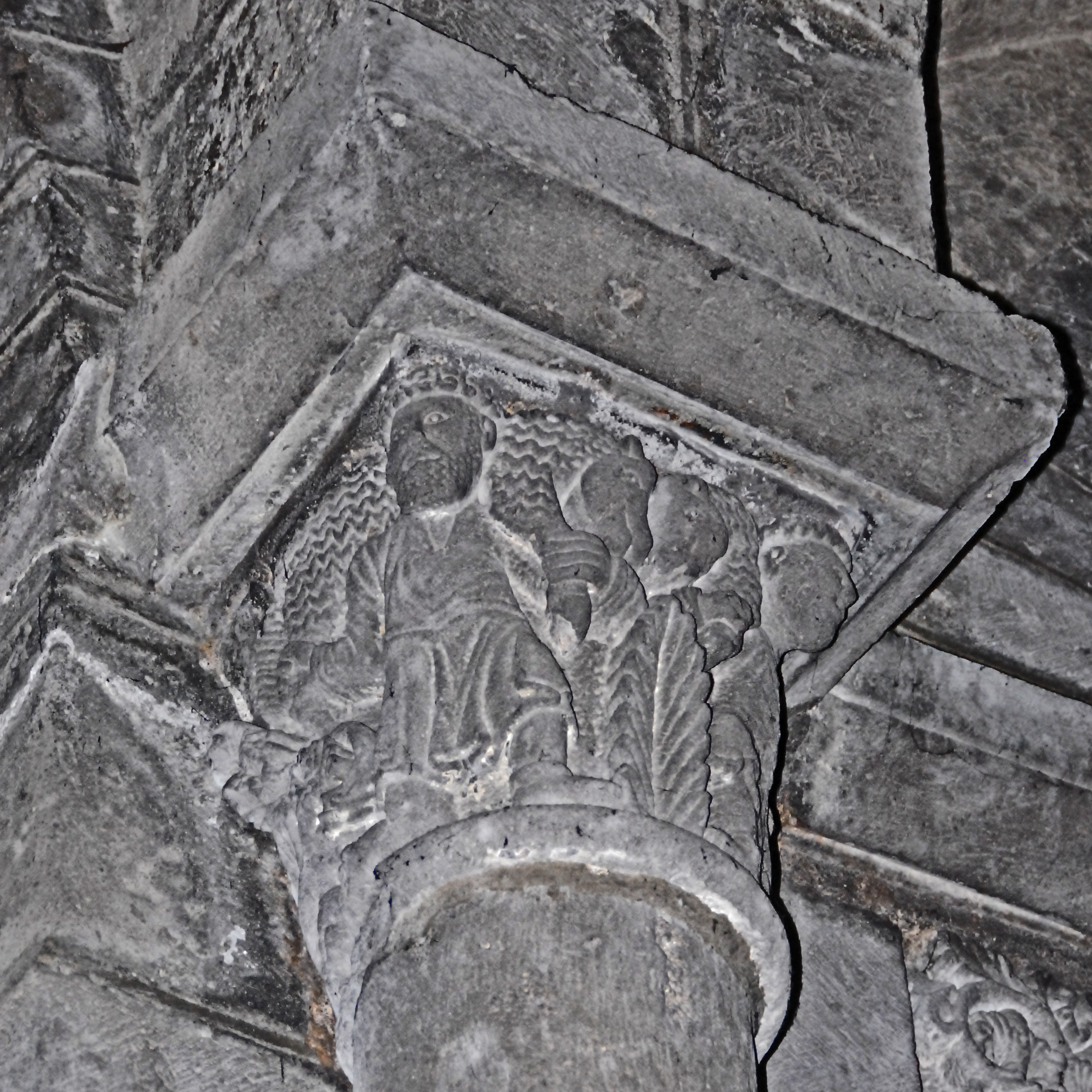 N.-D. d'Orcival, Kapitell,Schafsträgerf